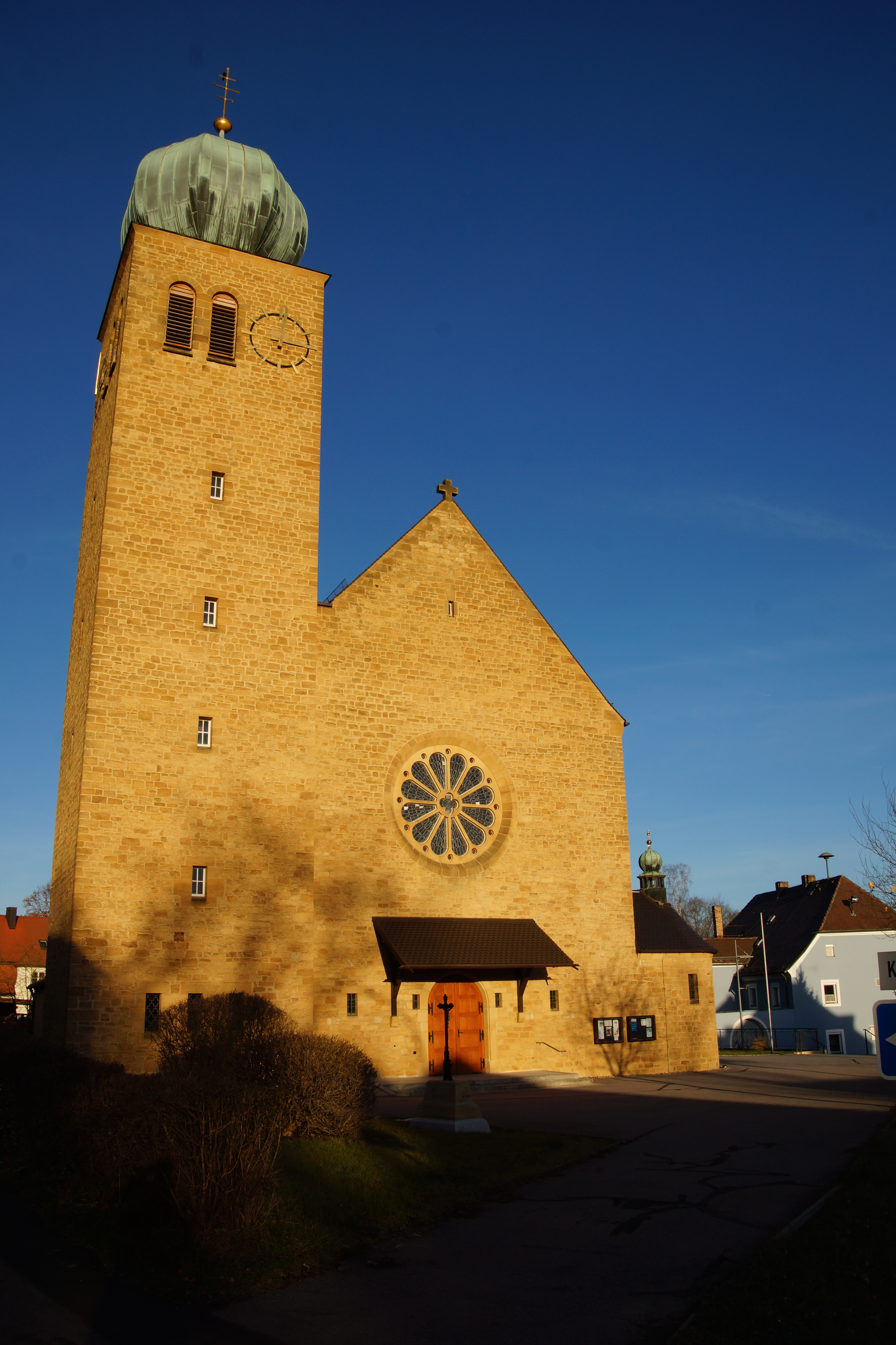 Die Pfarrkirche St. Barbara in Bodenwöhr